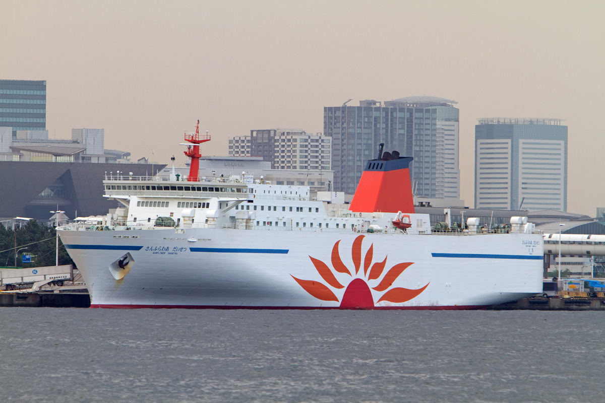 さんふらわぁ だいせつ（東京港フェリーターミナル・東日本大震災による暫定入港時）